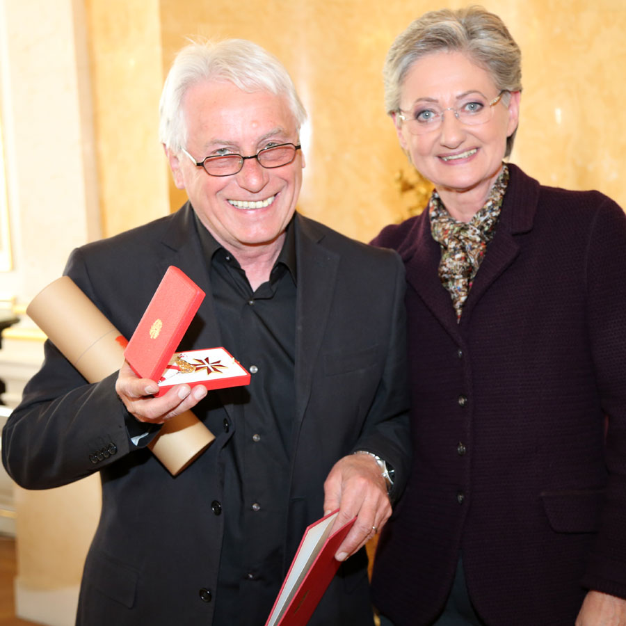 Rudolf Hinterleitner, Claudia Schmied-1823